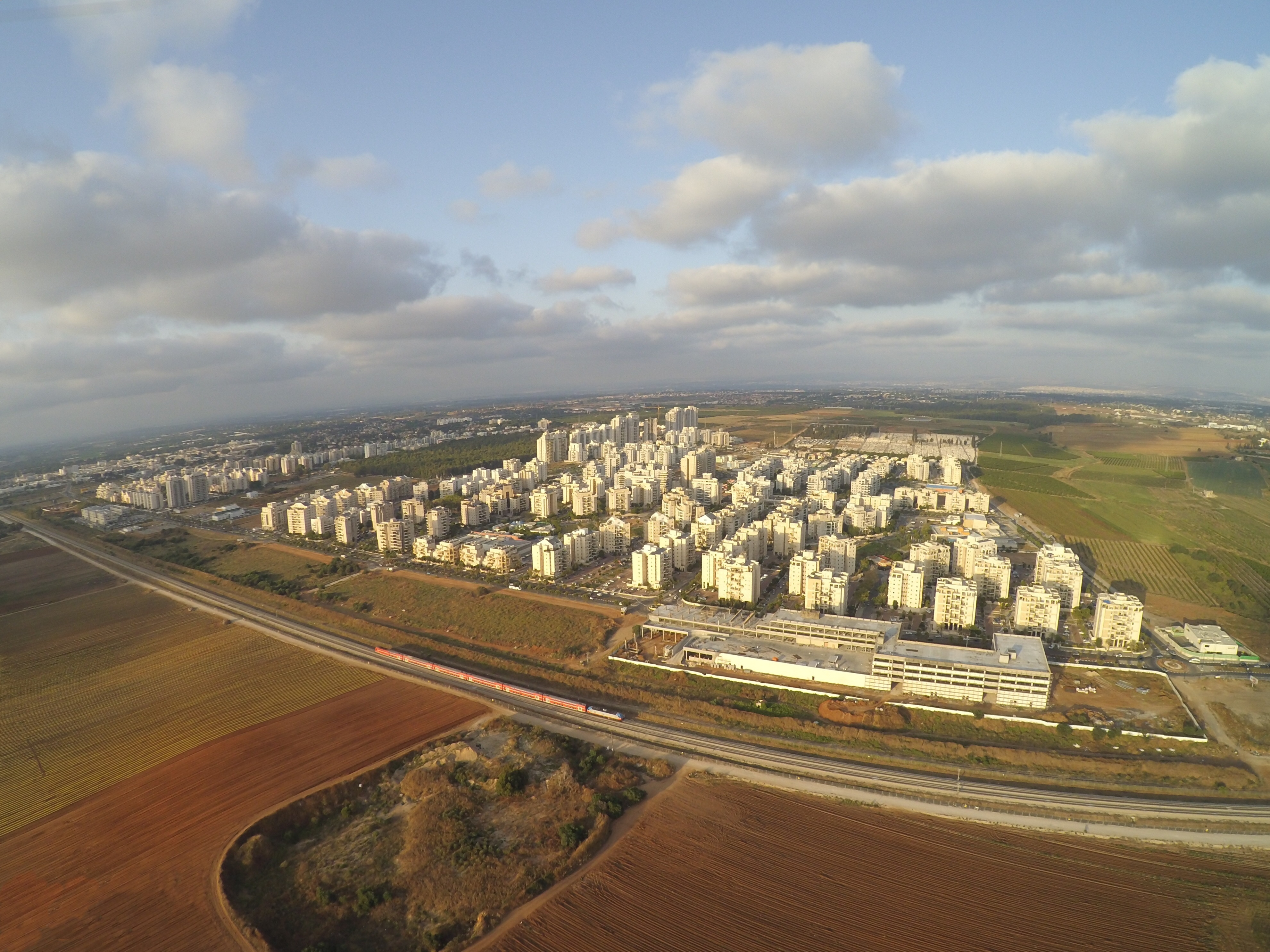 קרית השרון